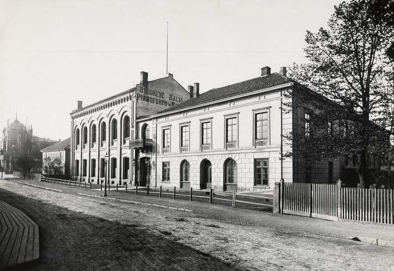 Brødrene Hals` konsertlokale og pianofabrikk i Stortingsgata og hovedinngangen til Tivoli i bakgrunnen.